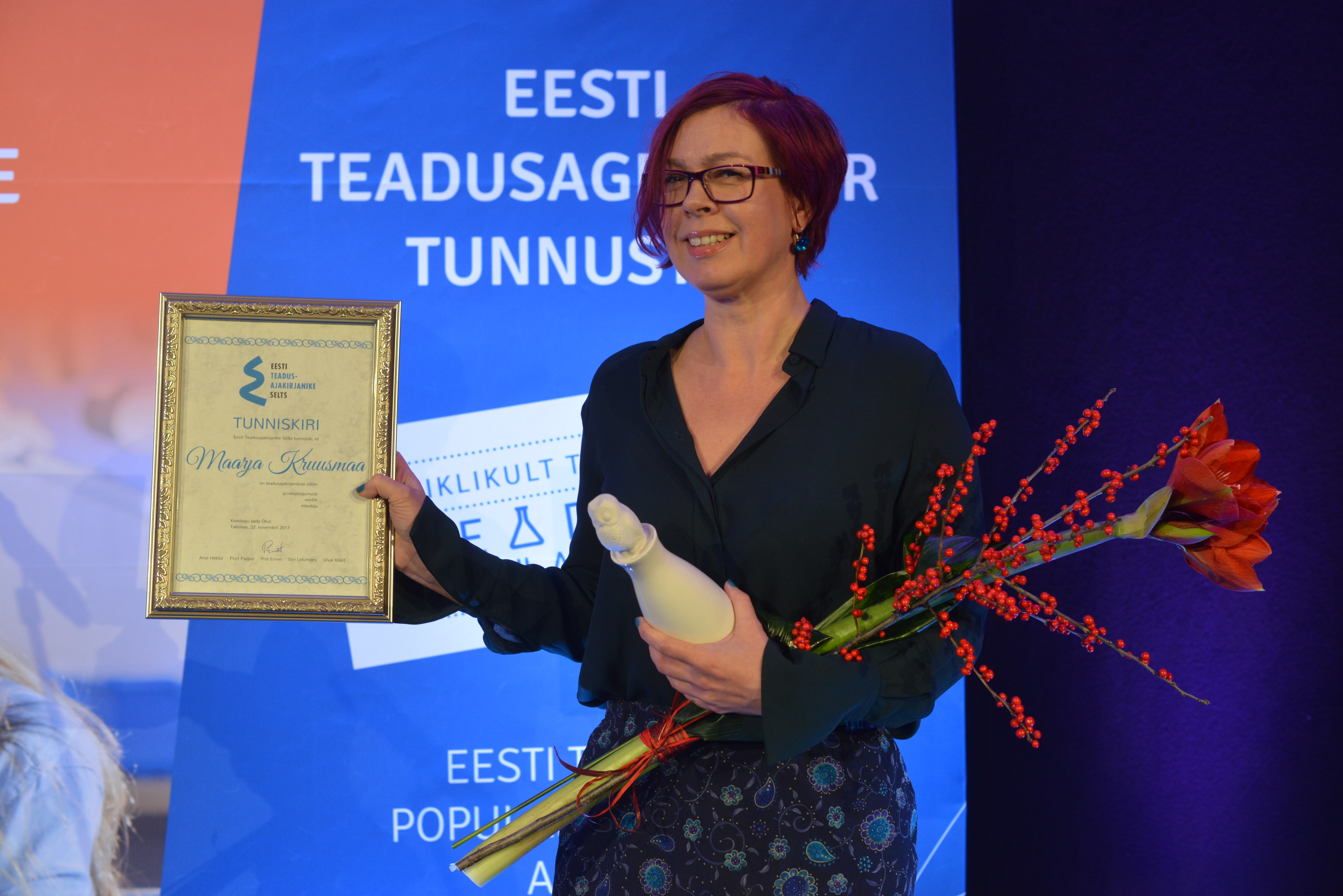 Maarja Kruusmaa Teaduskommunikatsiooni konverentsil 2017 pärast Teadusajakirjanduse sõbra auhinna vastuvõtmist.